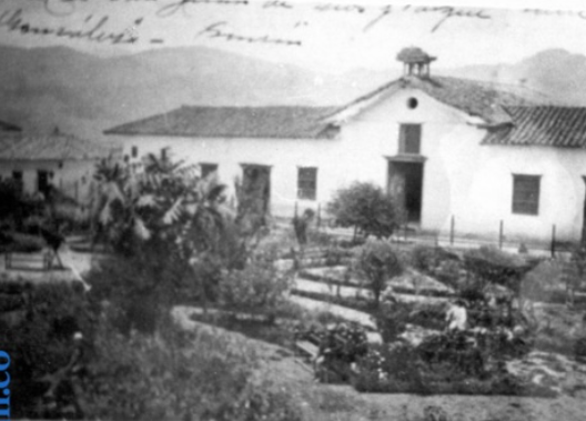 Aspecto del parque Gutiérrez González en 1917, se aprecia la Capilla de Valvanera y parcialmente el hospital.